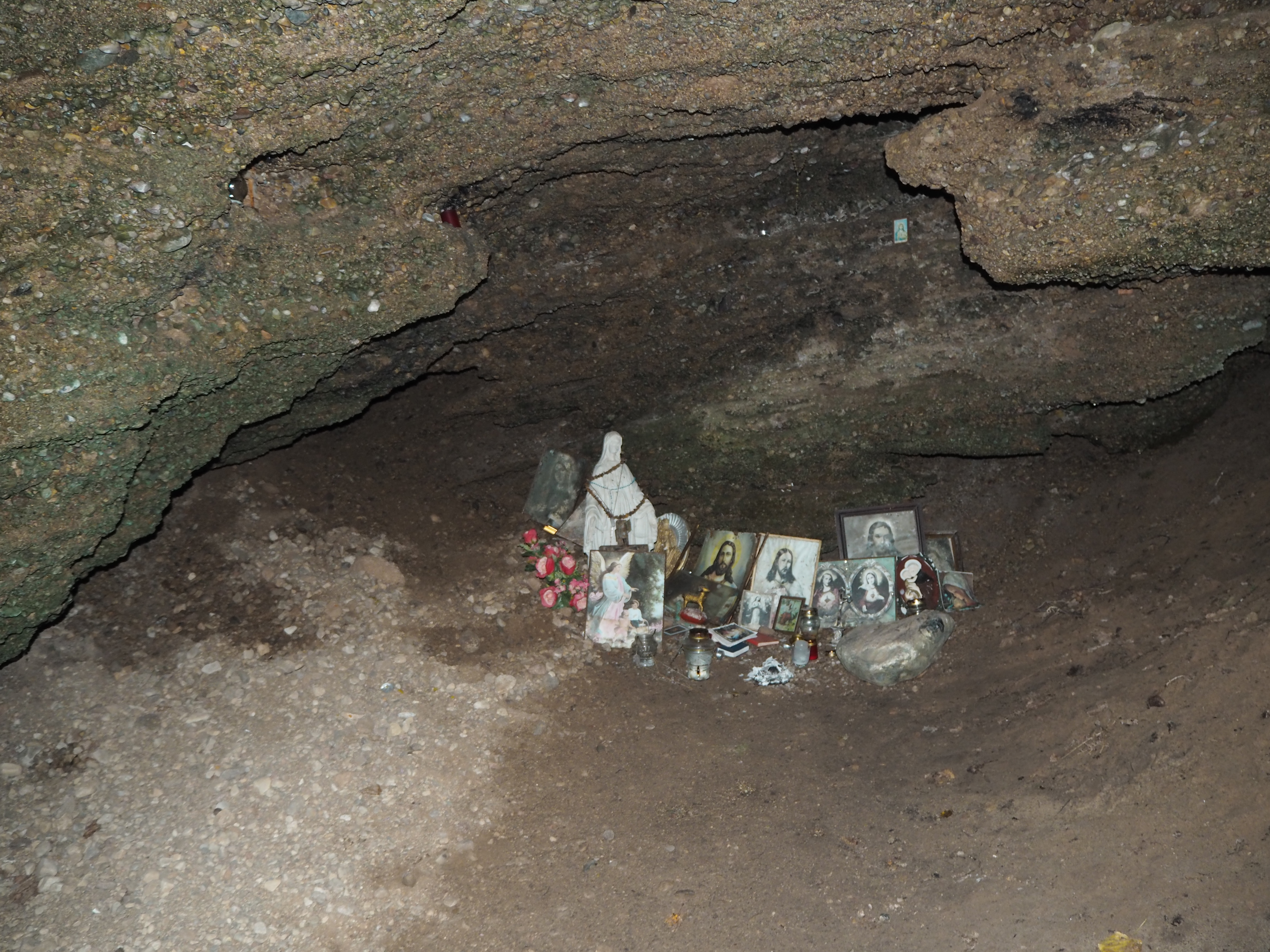 Skališkių oloje sudėti katalikiški paveikslėliai ir statulėlės